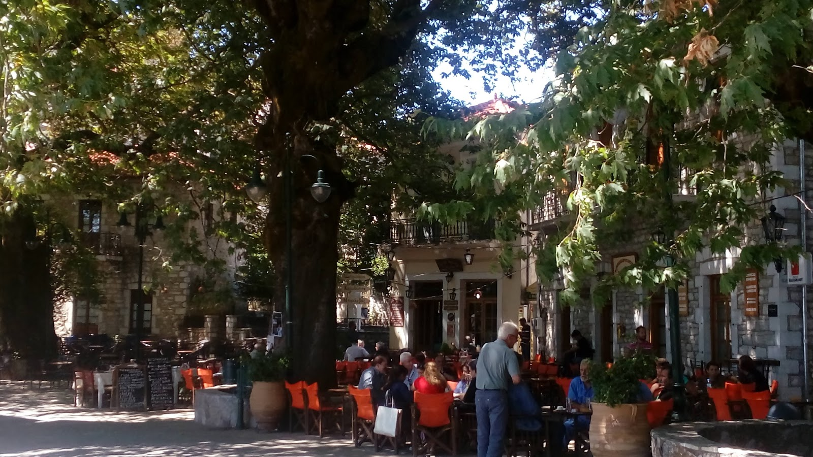 Η Πλατεία του Κοσμά